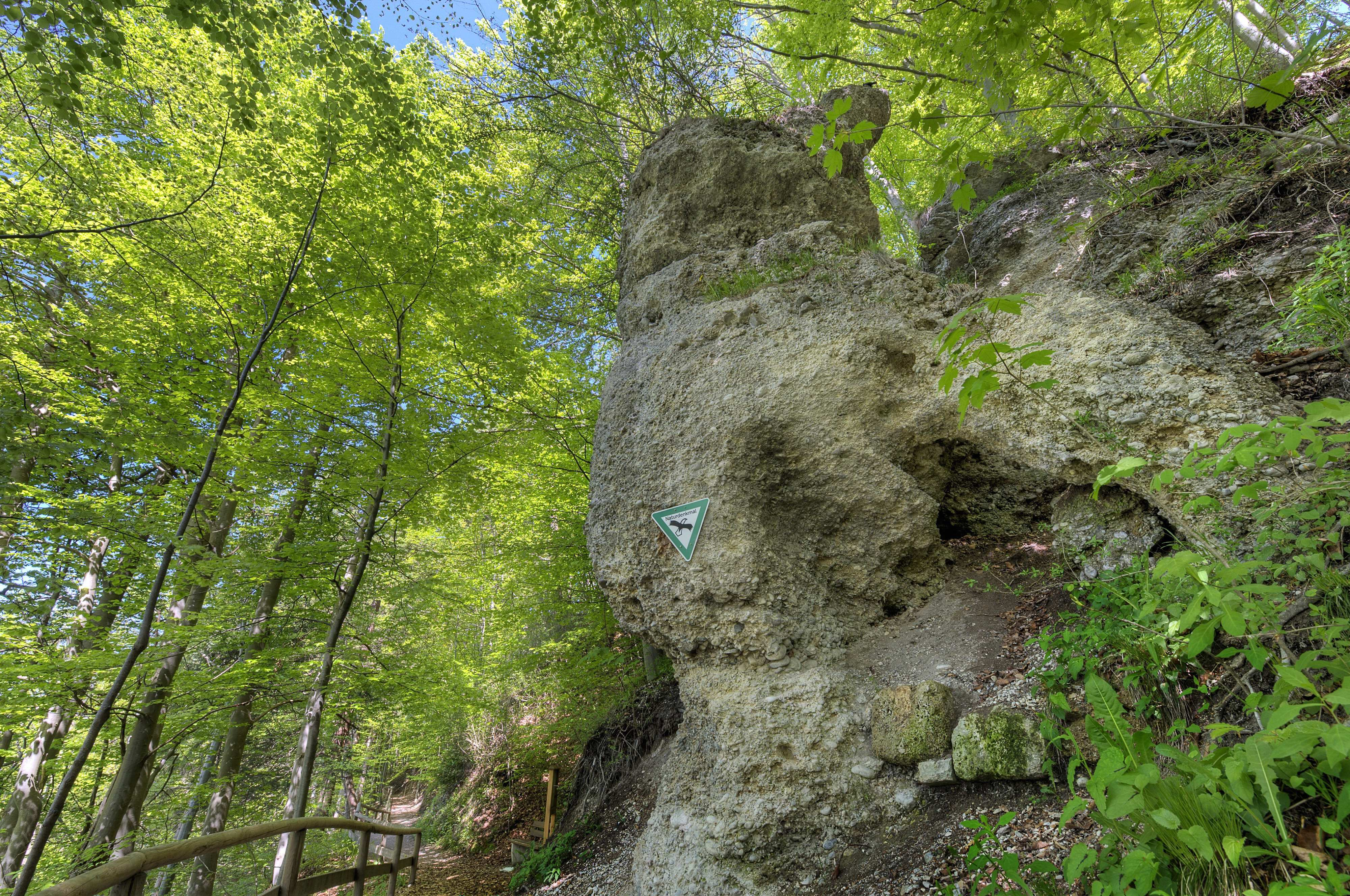 Nagelfluhfelsen am Kalvarienberg, Bad Tölz, Germany Geotopnummer 173A008